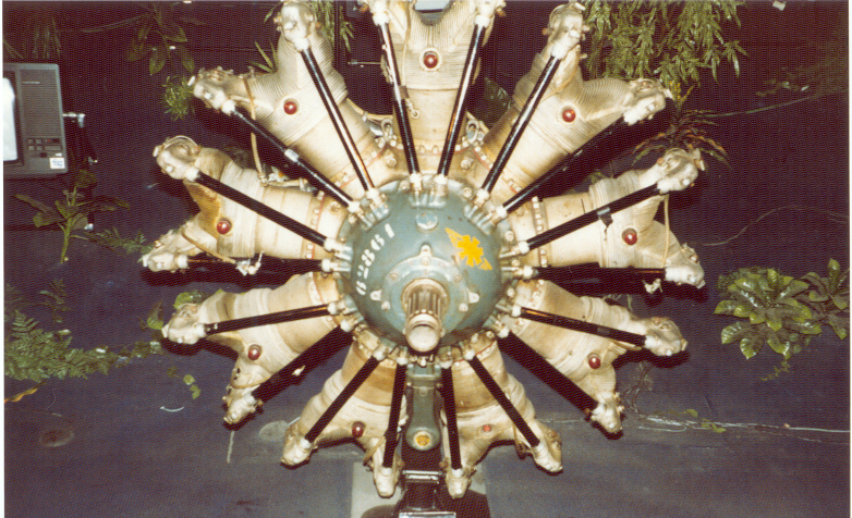 BMW 132 9-cilinder stermotor. Eigen foto Piero